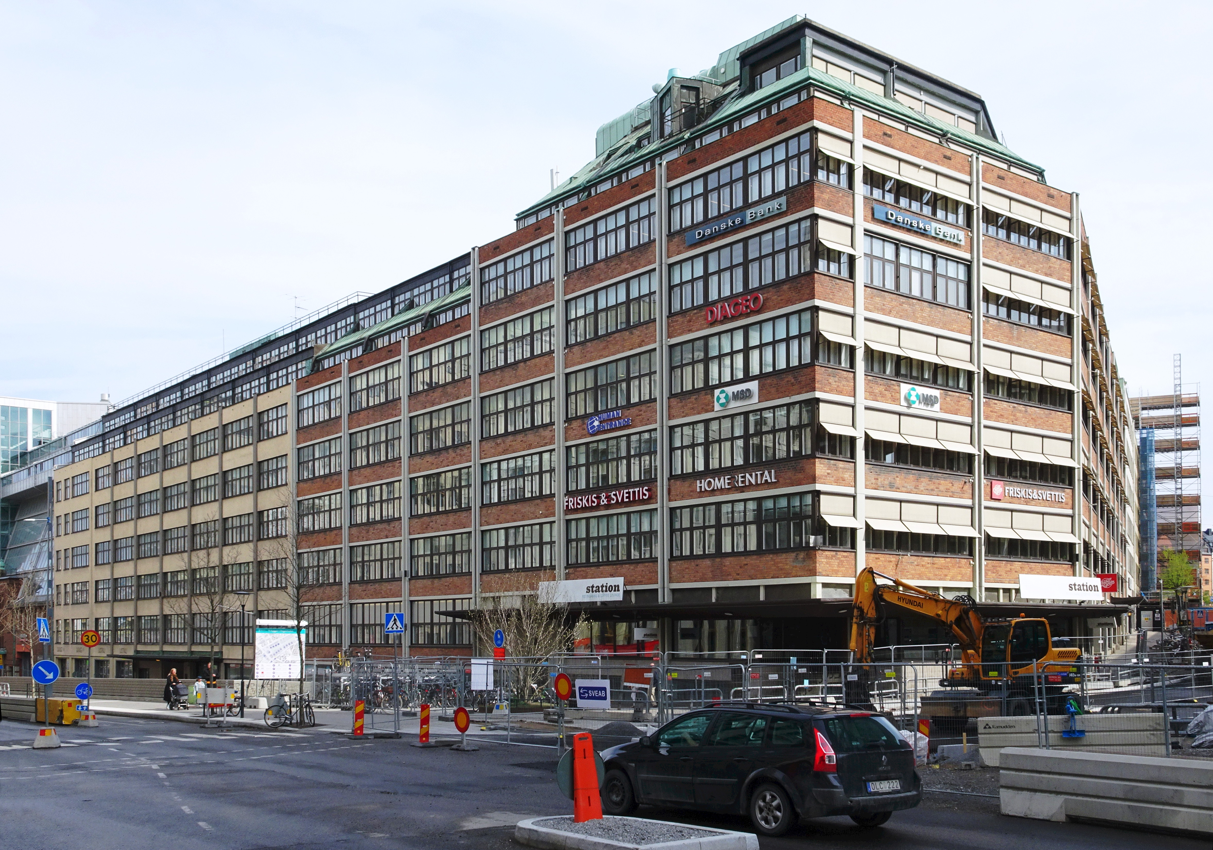 Blästern 6, Norra Stationsgatan 75-81, Tegeldel uppförd 1938, putsade delen 1946-48. Arkitekt Eskil Sundahl, beställare Bröderna Hedlund (fasad mot Norra Stationsgatan)